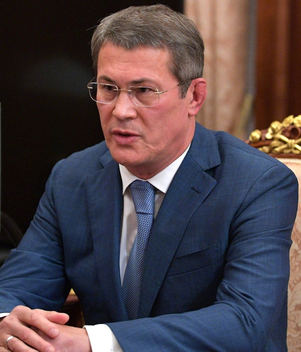 Радий Хабиров во время рабочей встречи с Президентом России Владимиром Путиным